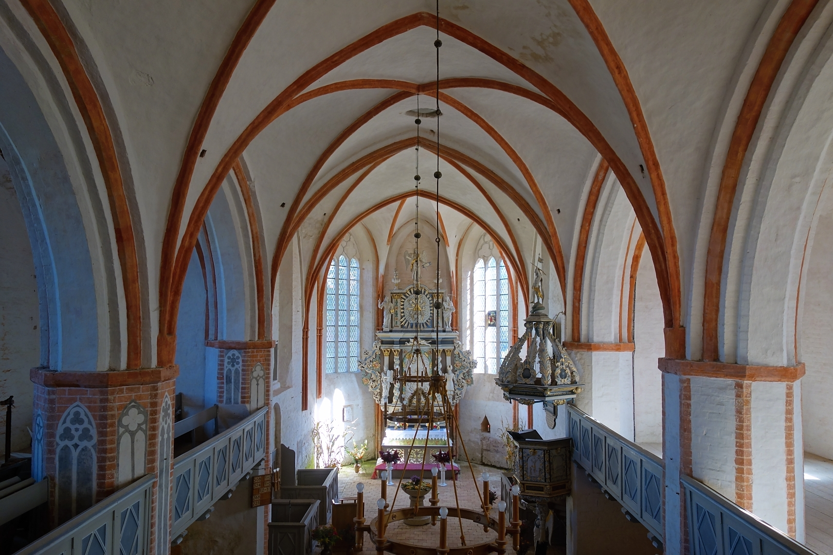 Kirchenschiff der Dorfkirche in Saal